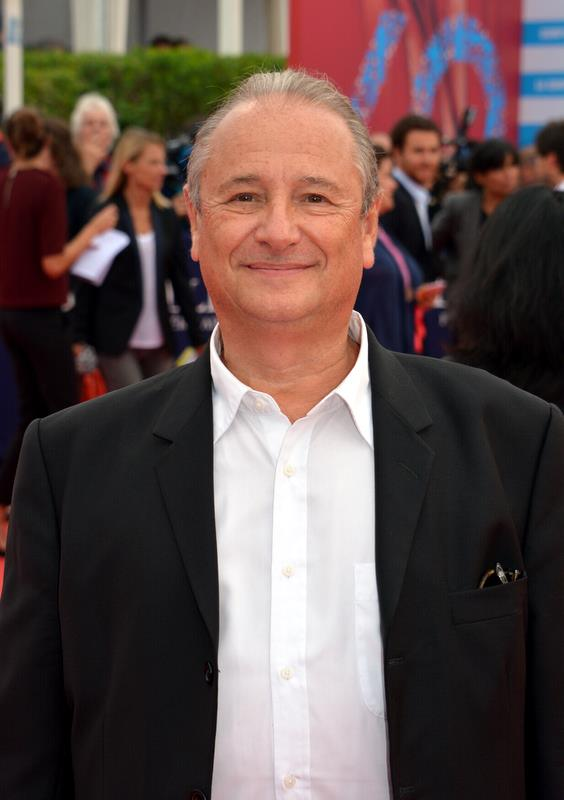 Patrick Braoudé au festival de Deauville